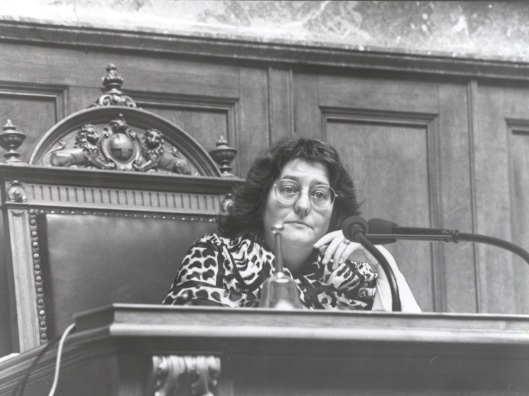 Gret Haller, Schweizer Politikerin, im Bild Nationalratspräsidentin